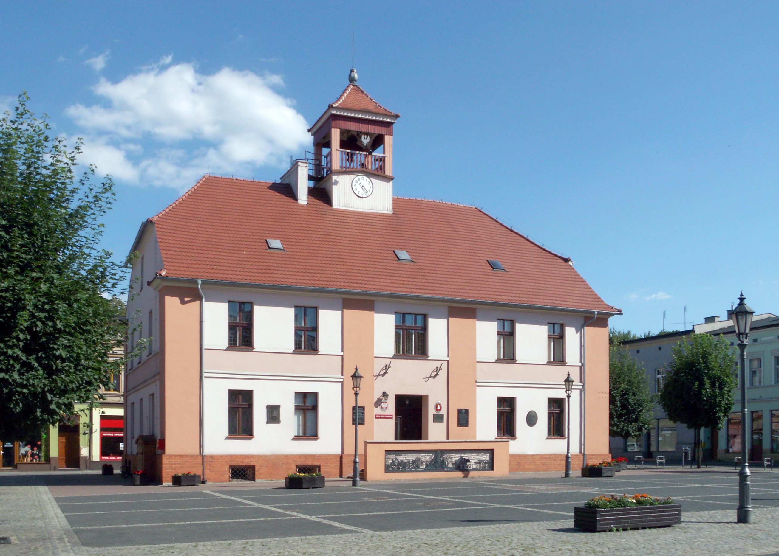 Ostrzeszowski ratusz.